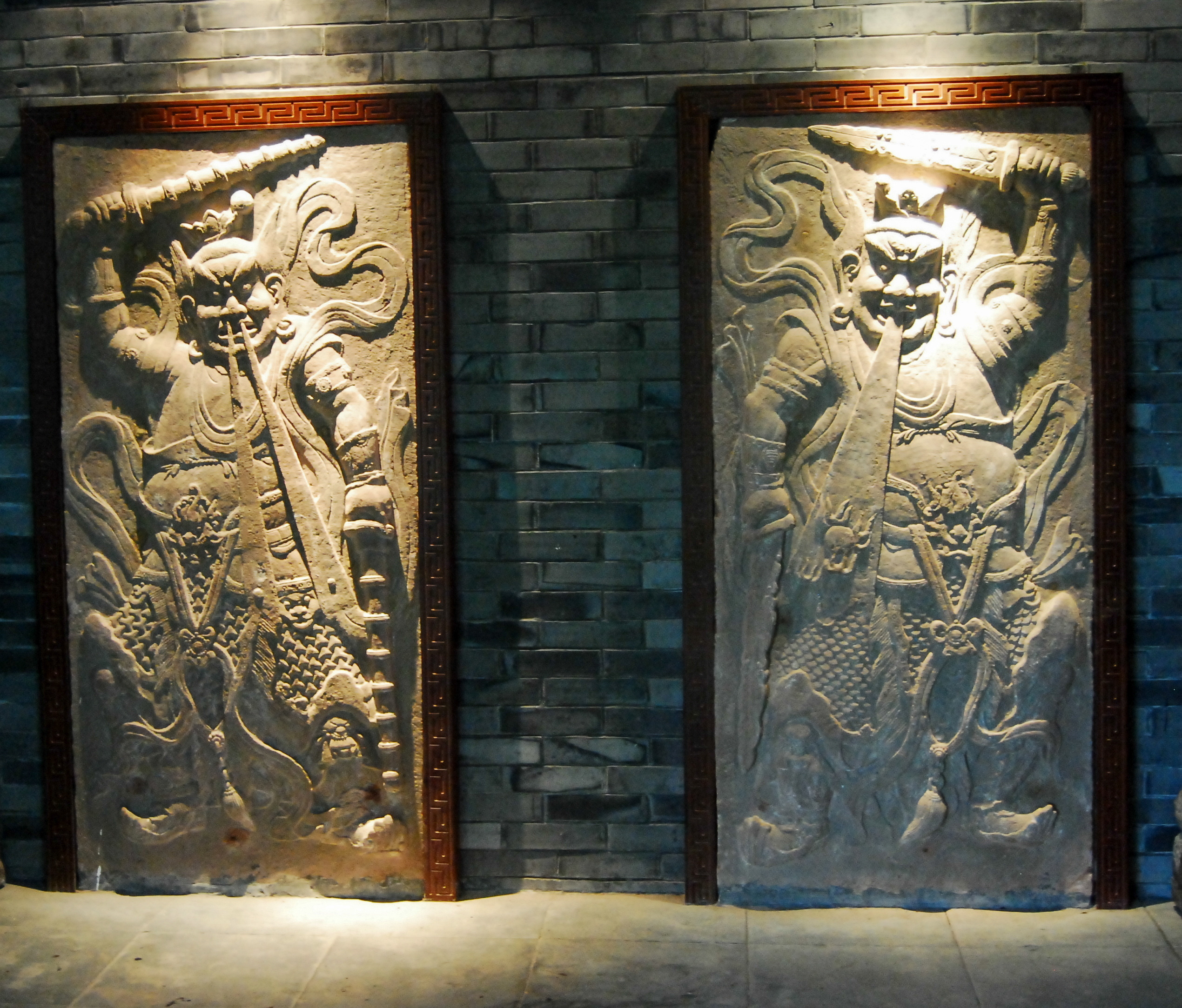 中文（中国大陆）: 都江堰二王庙哼哈二将